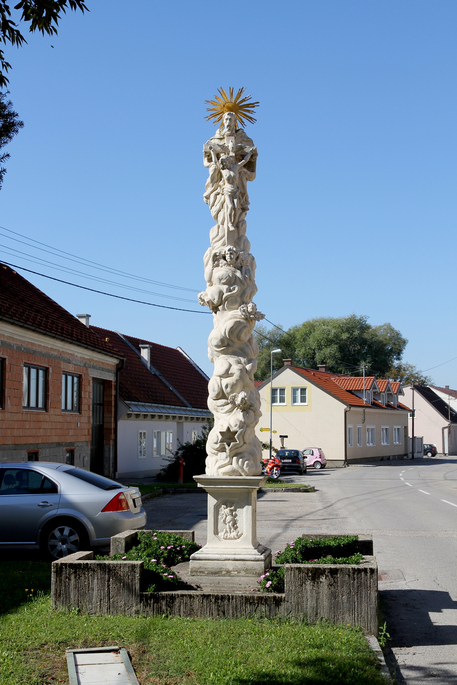 Pestsäule in Oberzögersdorf, ein Ortsteil der niederösterreichischen Stadt Stockerau.